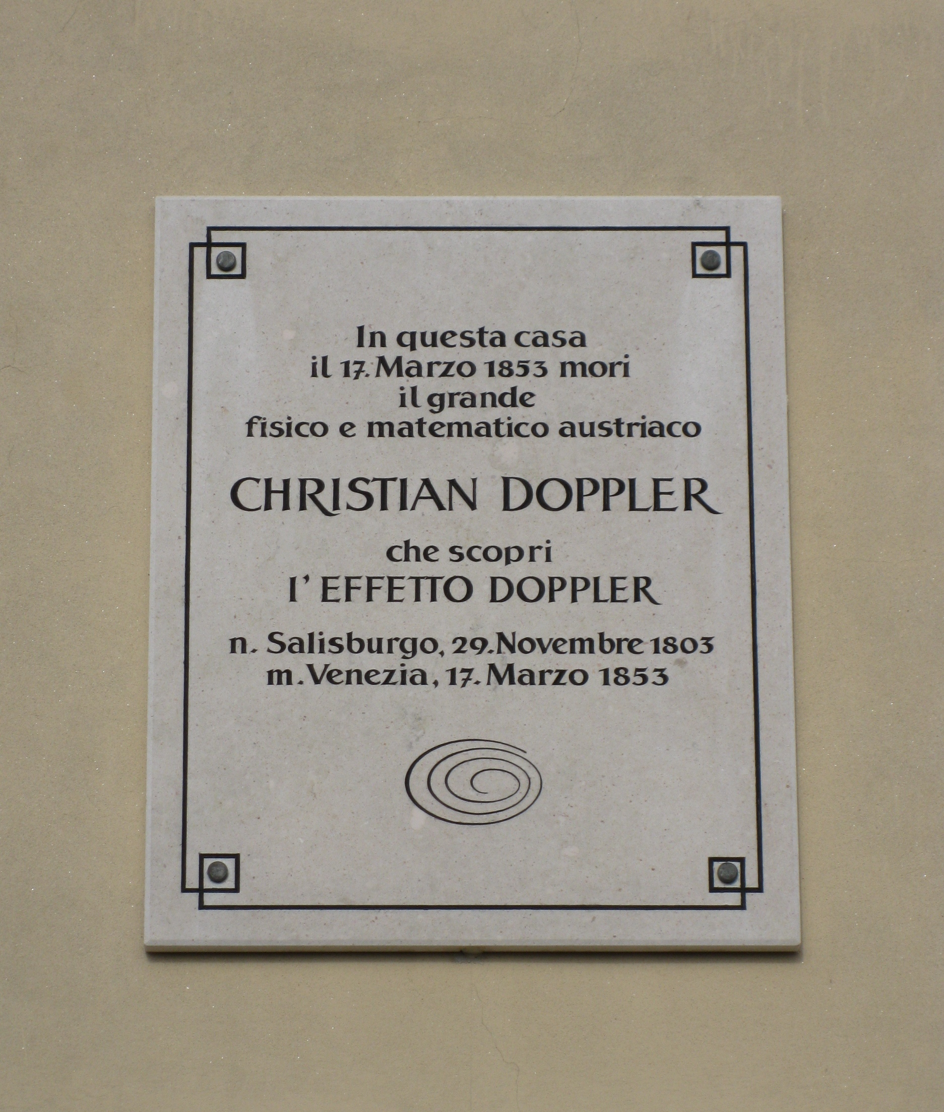 Venezia - Targa a Doppler, RIVA SCHIAVONI, 4133 Castello